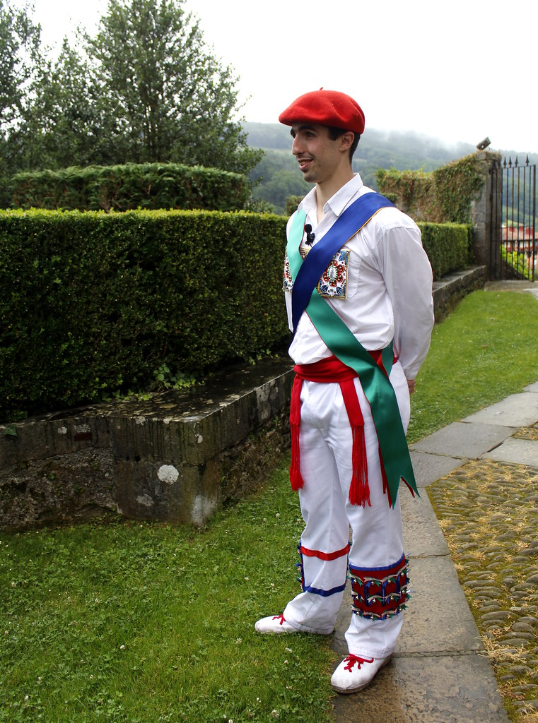 Lesakako dantzak. Jantzia.